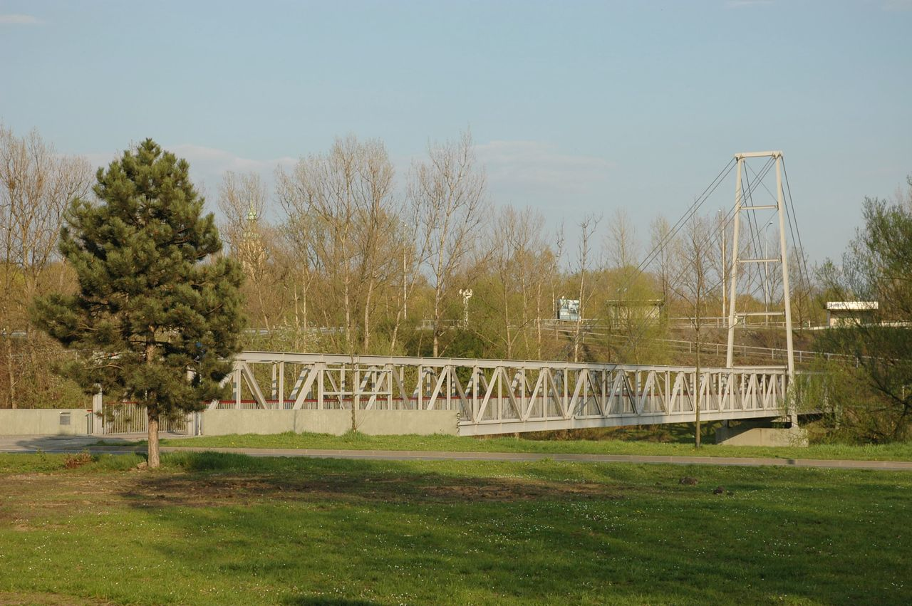 Hradní lávka v Ostravě, pohled z moravské strany města